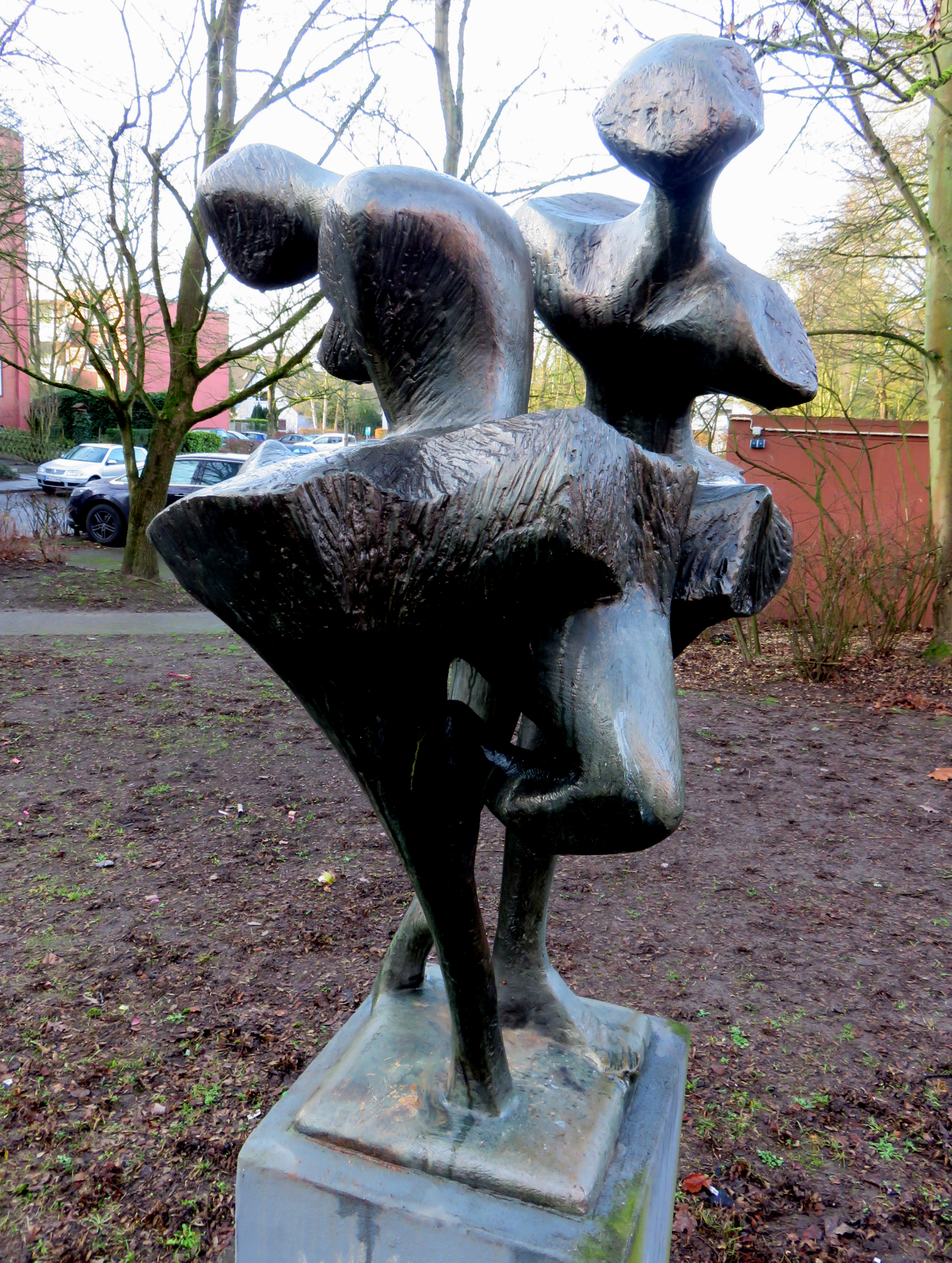 Bronze-Skulptur Tänzerinnen, Benatzkyweg 14 in Hamburg-Rahlstedt, Ortsteil Meiendorf. Die Skulptur wurde 1974 von der deutschen Bildhauerin Gisela Engelin-Hommes geschaffen. Eigentümerin: SAGA.